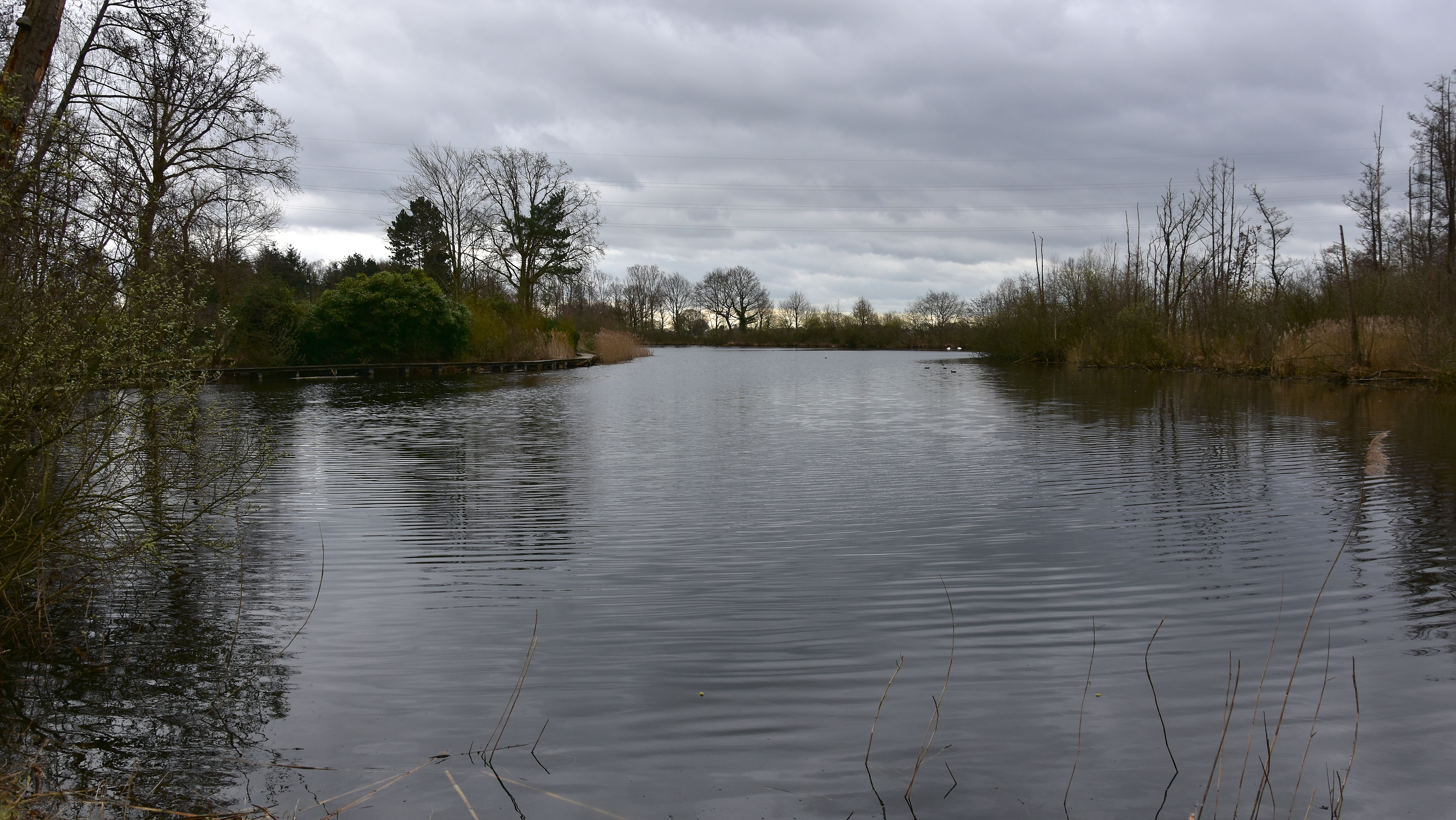 Elen De Broeken 16-03-2020 10-42-16